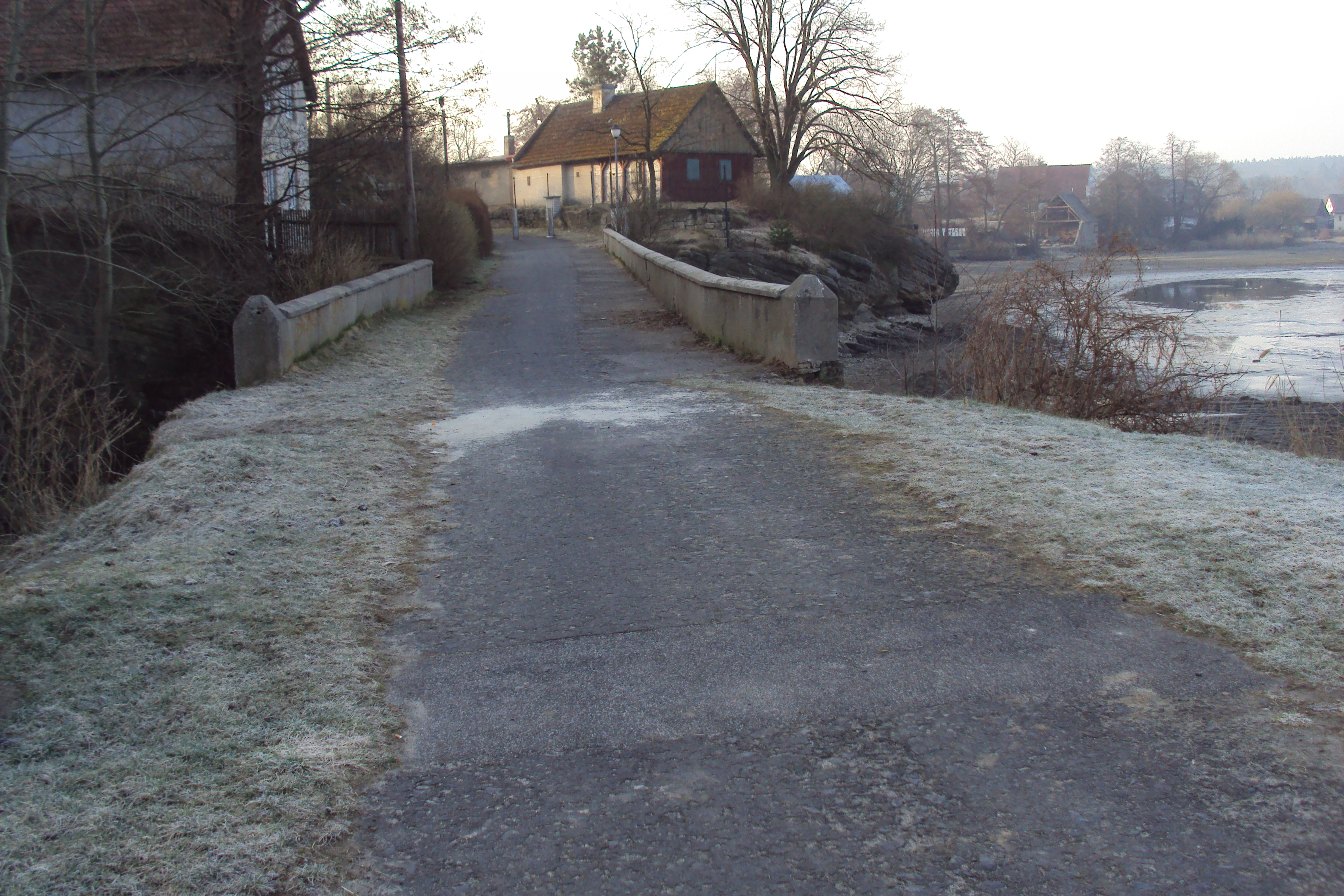 Rybnov je dnes částí Holan na Českolipsku na okraji Holanského rybníka